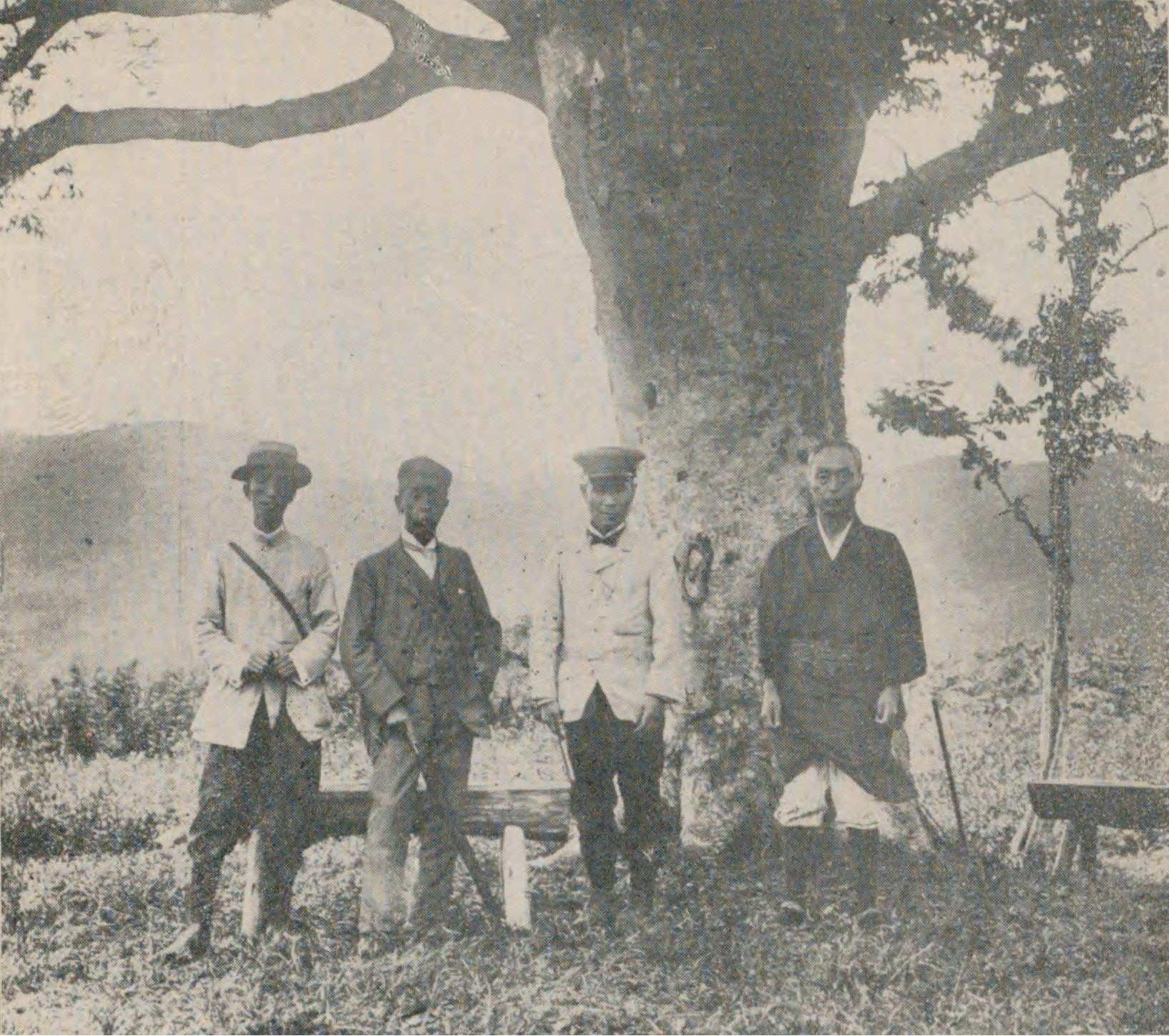 宝の峰 斎藤善右衛門・坪井正五郎 明治43年7月石器時代遺跡発掘